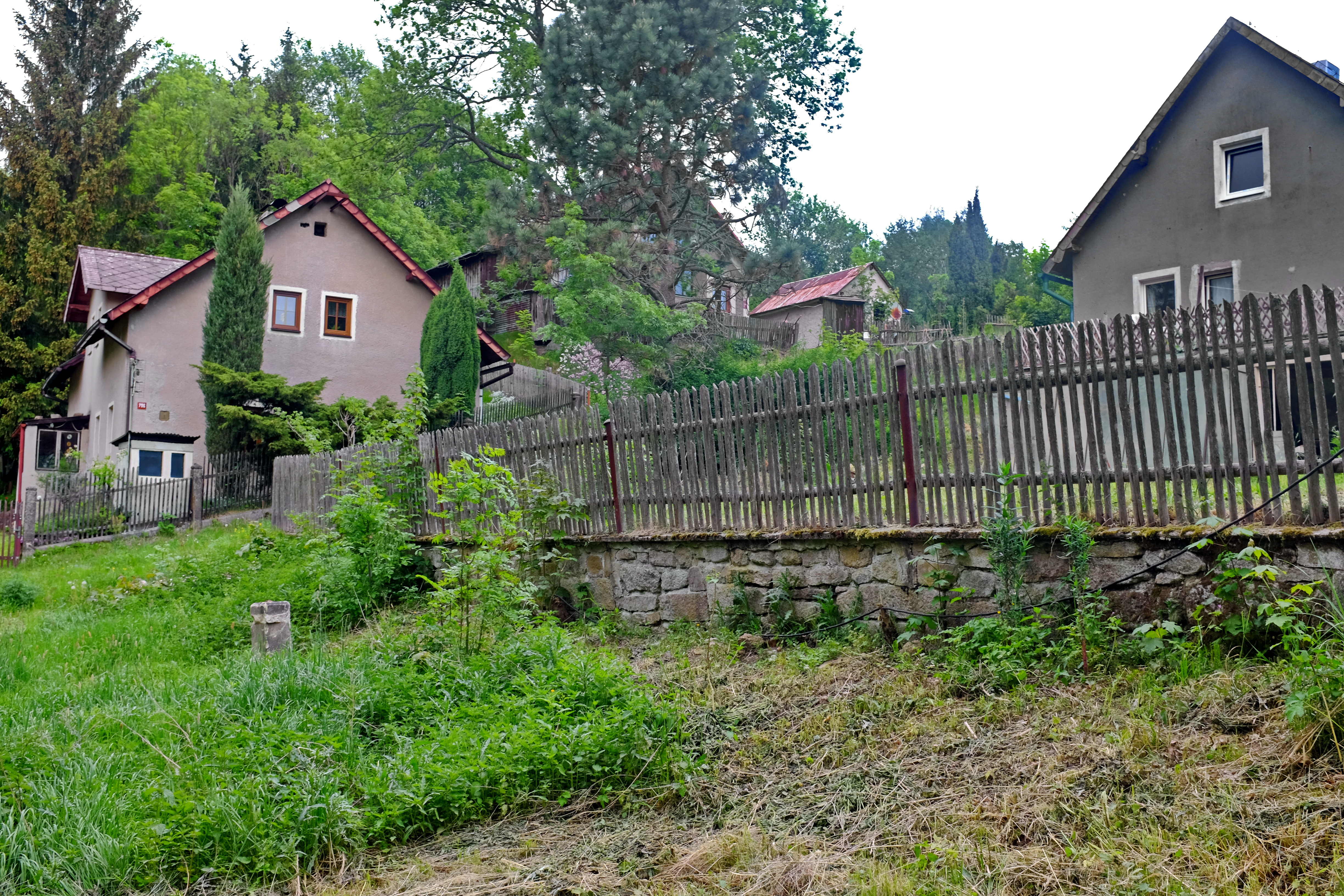 Bošířany, zaniklá obec, dnes osada města Horní Slavkov, okres Sokolov